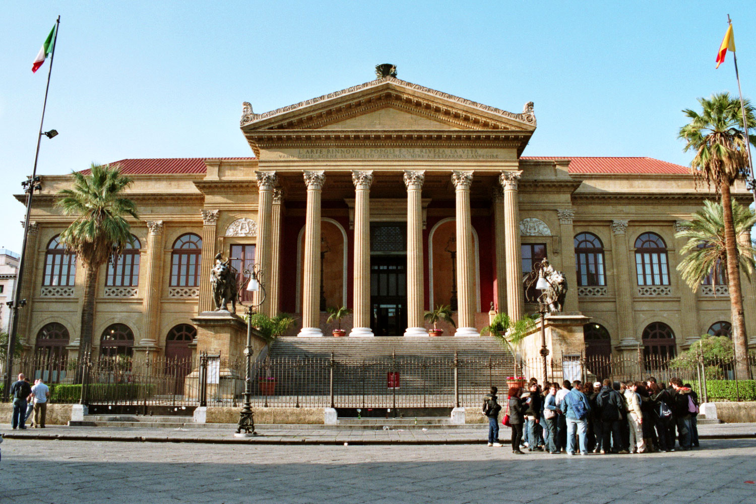 Teatro Massimo, Palermo Main facade